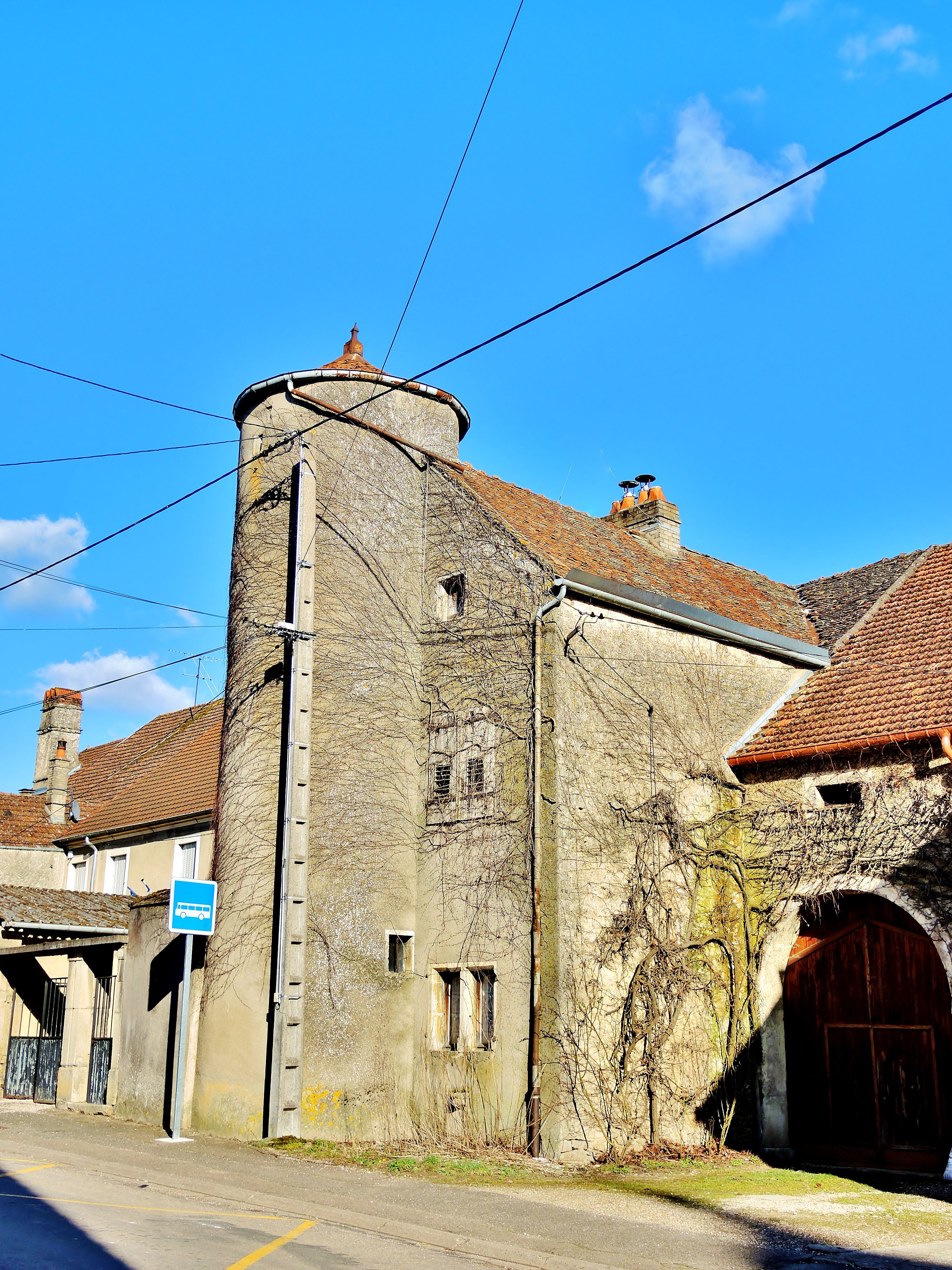 Maison avec tourelle au centre du village de Granvelle. Département de la Haute-Saône